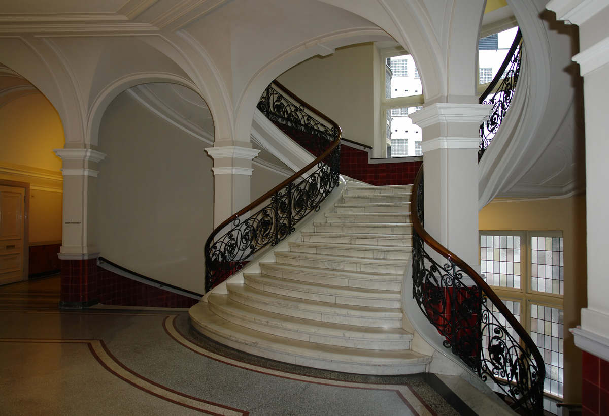 Baumwollbörse in Bremen. Treppenhaus am Haupteingang